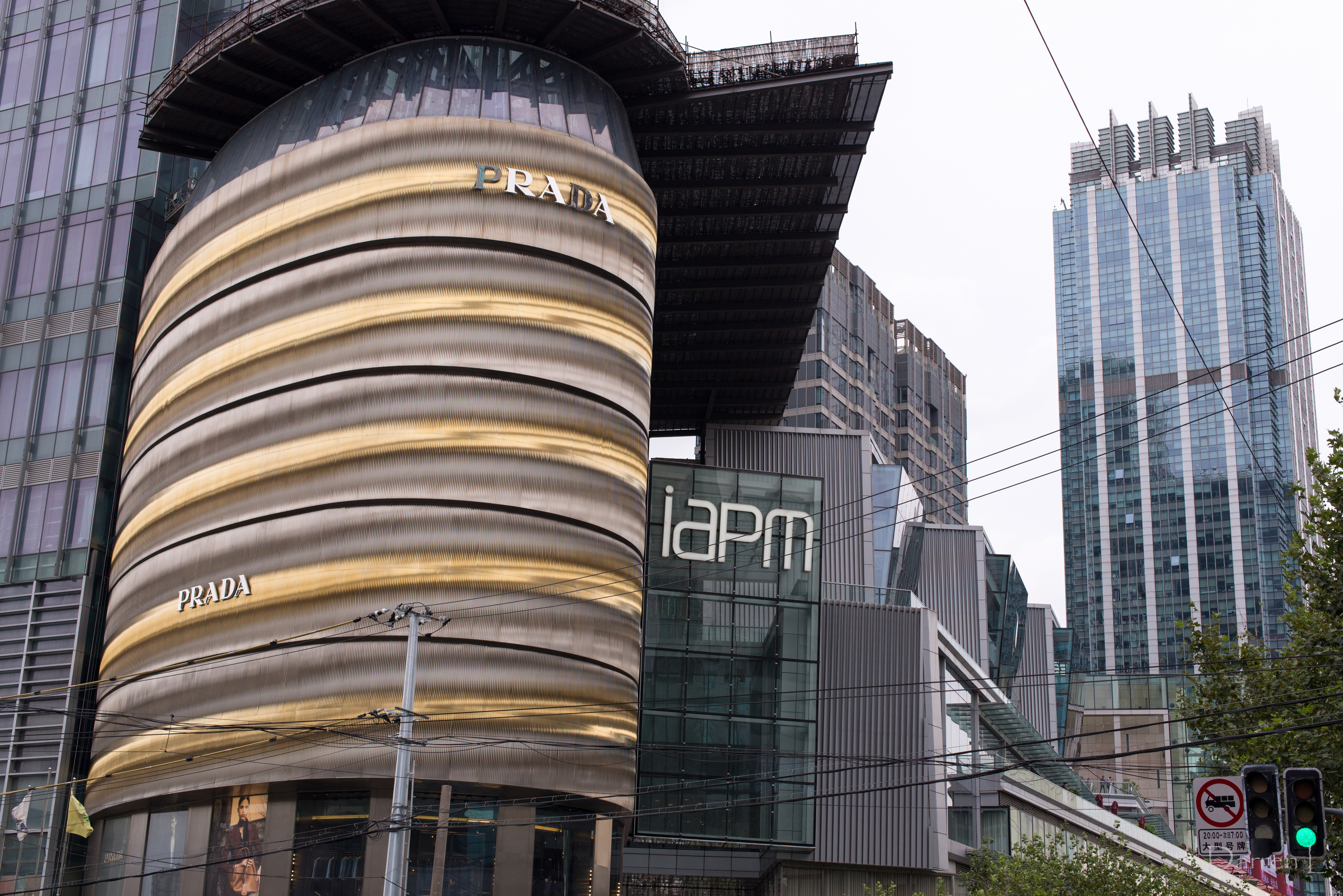 2014 SEP Shanghai/Hangzhou